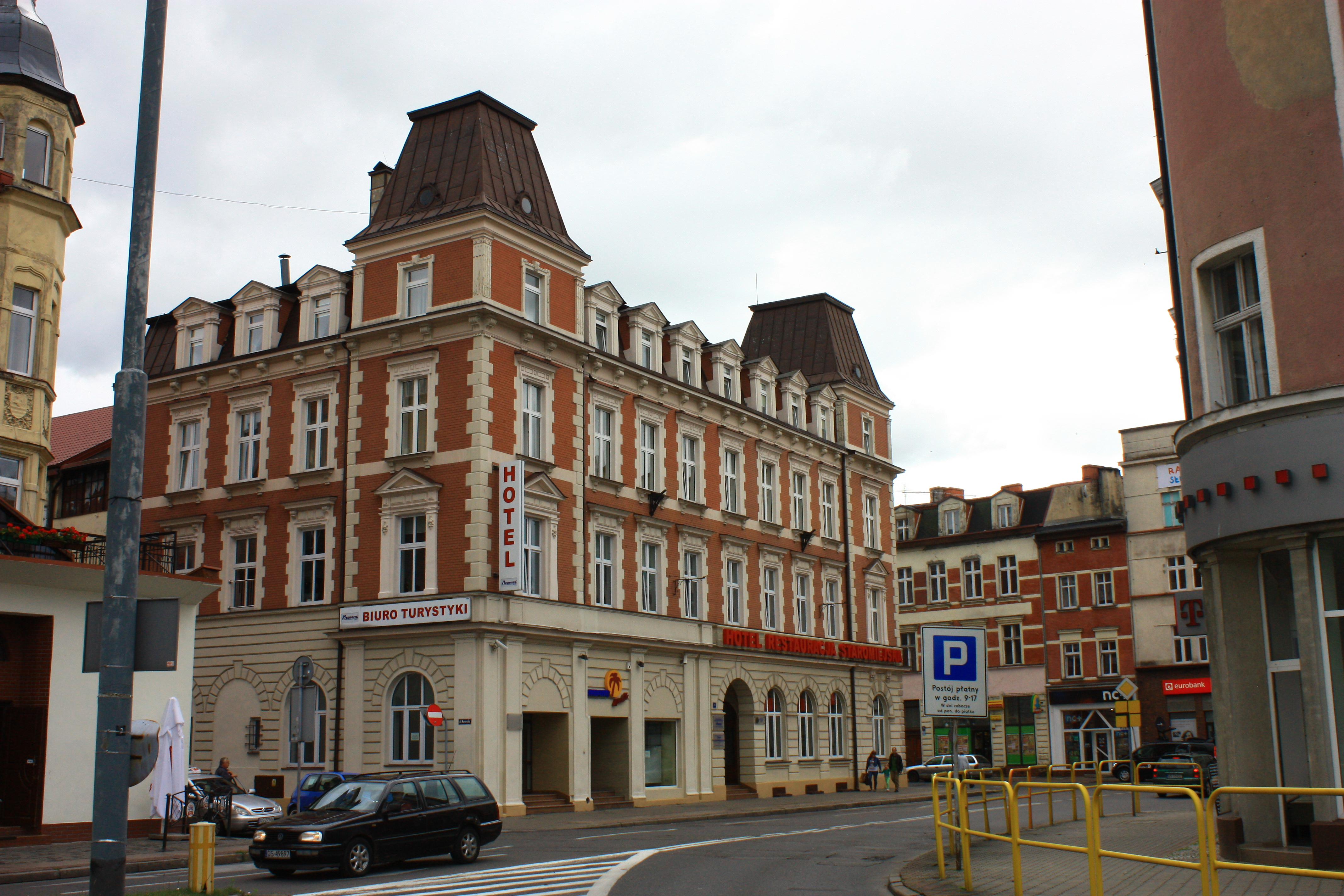 Słupsk, ul. Jedności Narodowej 4-5 - hotel, 1896-1913 06.2009.